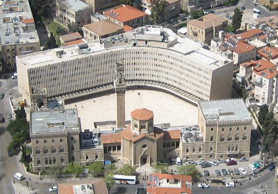 בית החולים האיטלקי ובנין משרד החינוך, ירושלים. צילום אוויר לכיוון צפון-מערב. The Italian hospital, Jerusalem, Israel. רישיון נוצר על ידי משתמש:אסף.צ